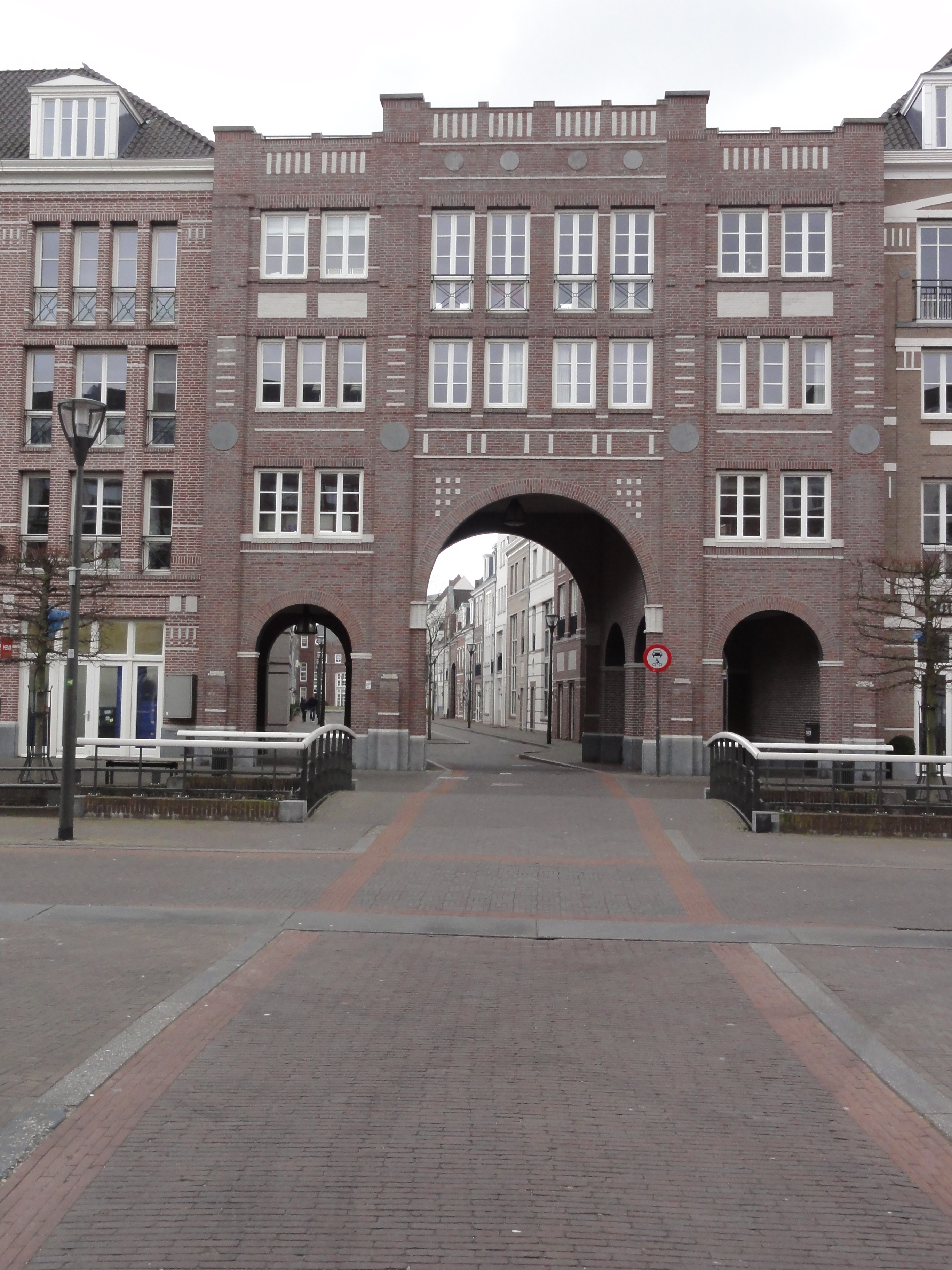 Brandevoort